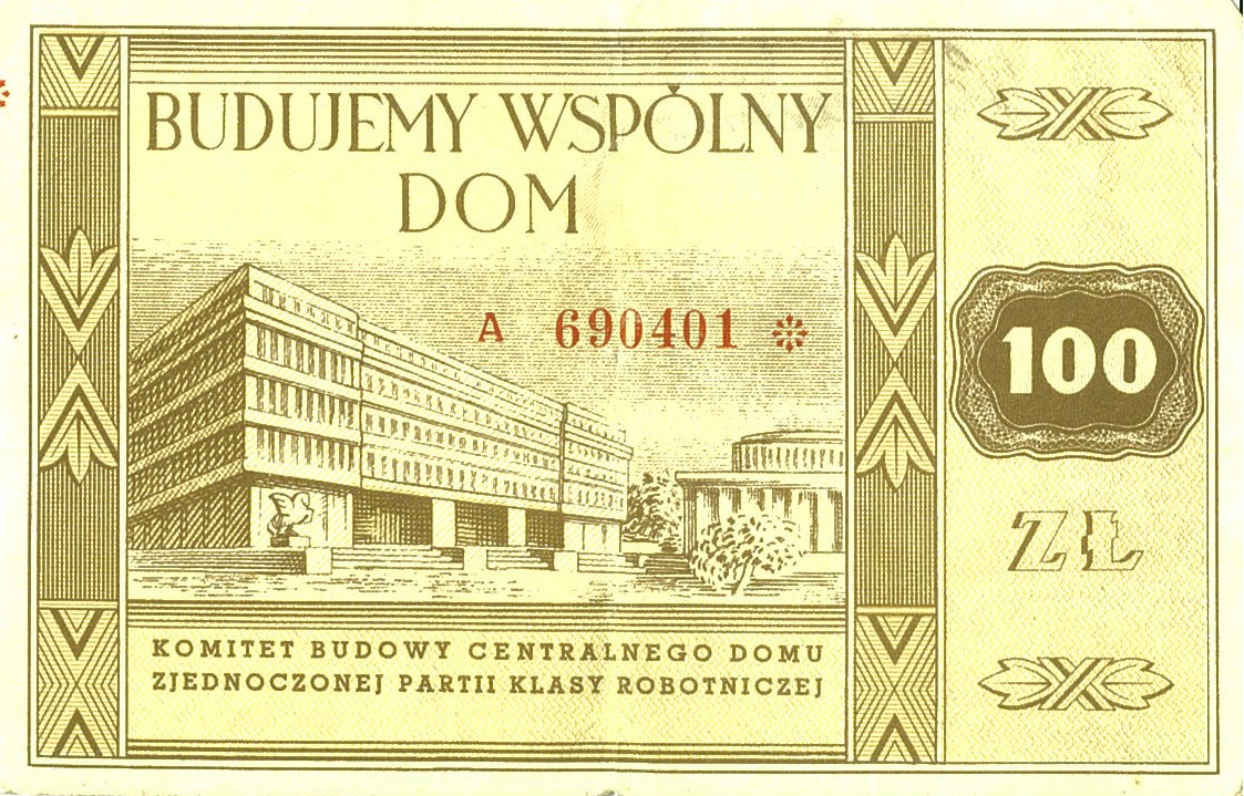 Cegiełka o nominale 100 zł